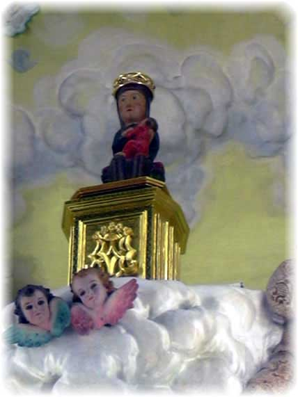 Virgen del Rebollet en su camerino